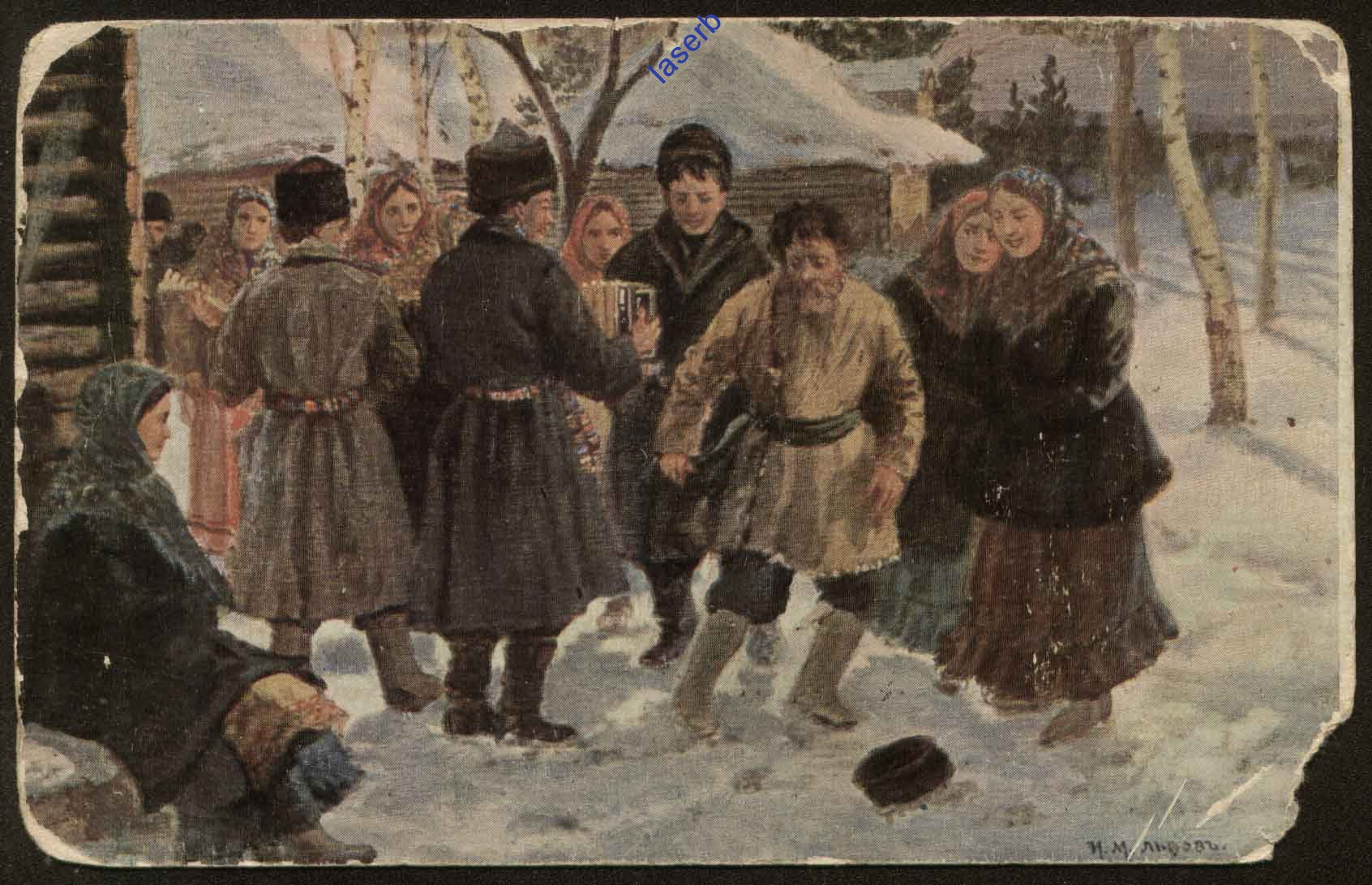 И. М. Львов. Касьянов день. Подгулял. Дореволюционная открытка